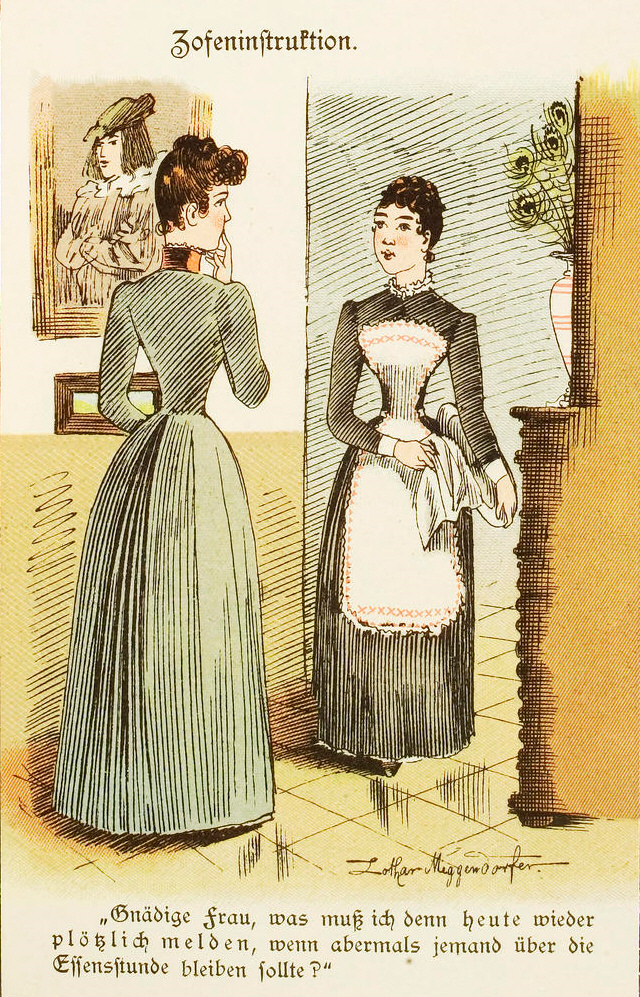 Zofeninstruktion